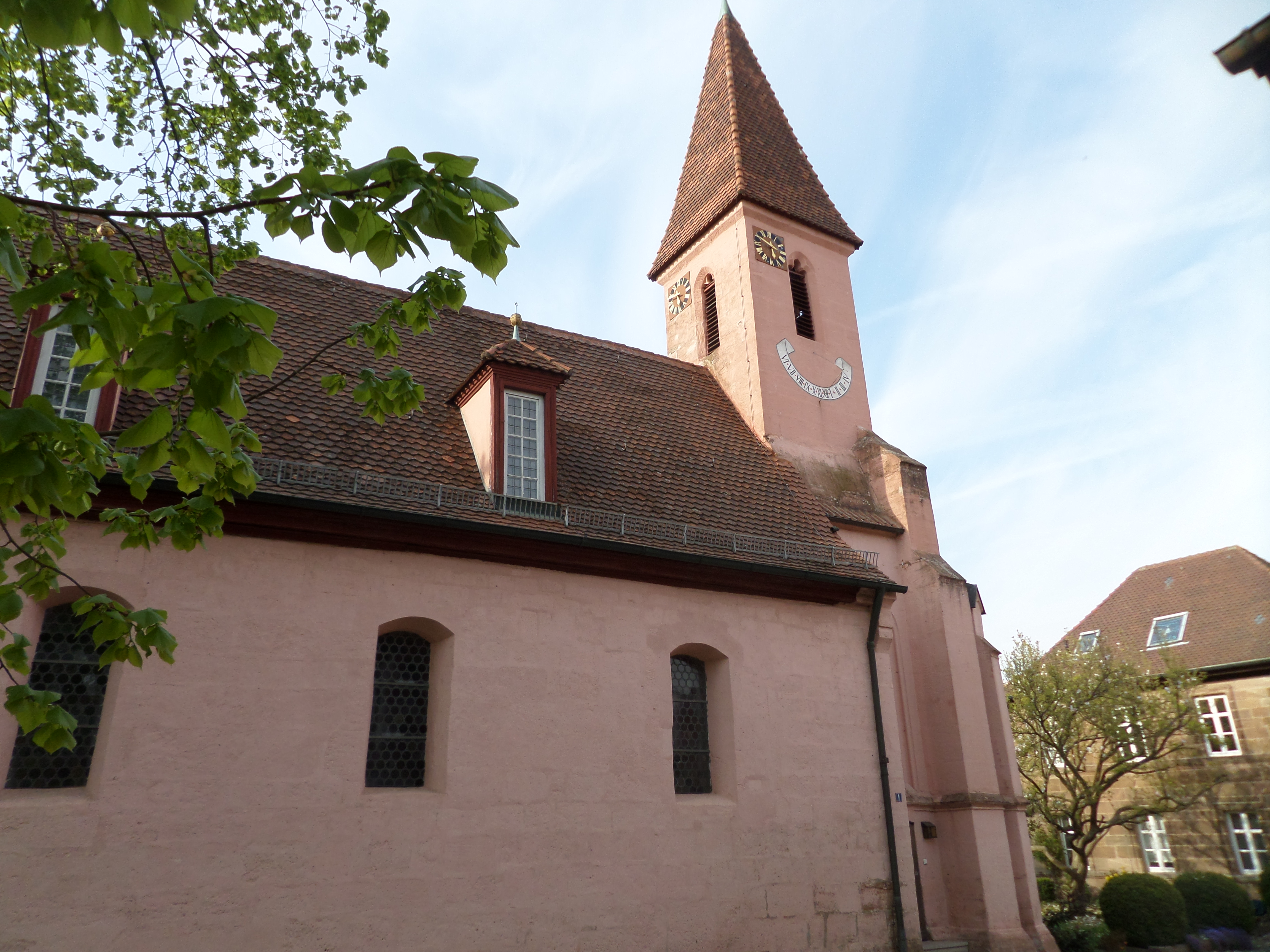 Evang.-Luth. Pfarrkirche St. Lorenz Oberasbach